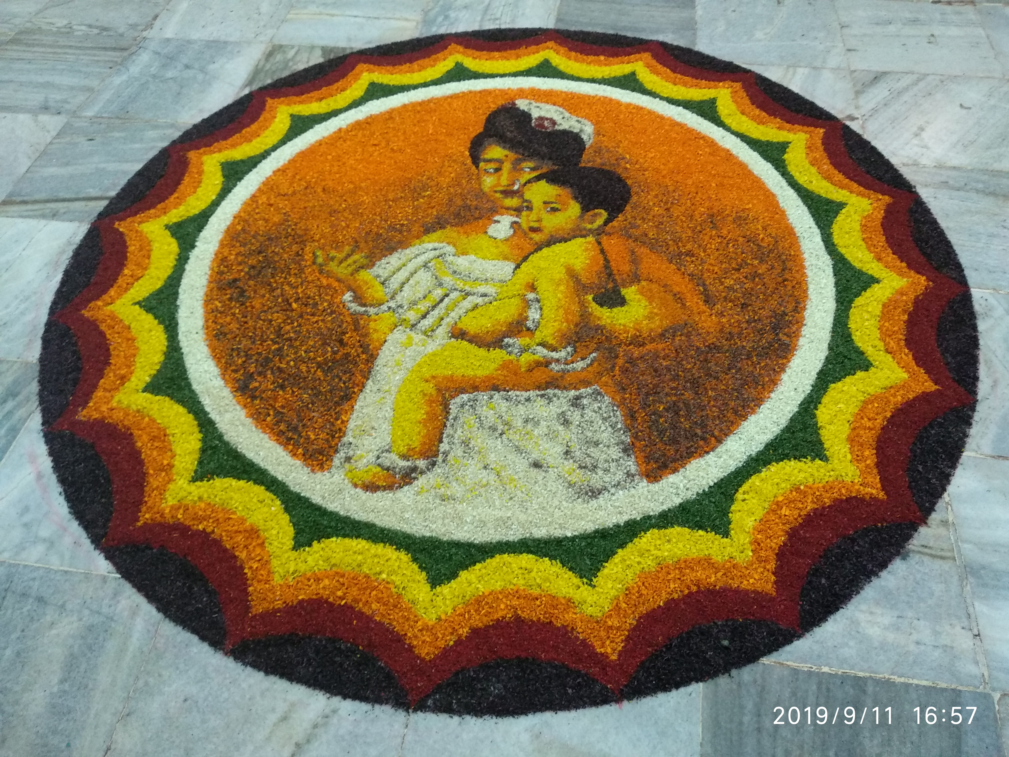 വിശേഷ സന്ദർഭങ്ങളിൽ പൂക്കളും ഇലകളും ഉപയോഗിച്ച് ഒരുക്കുന്ന കലാരൂപമാണ് 'പൂക്കളം'.